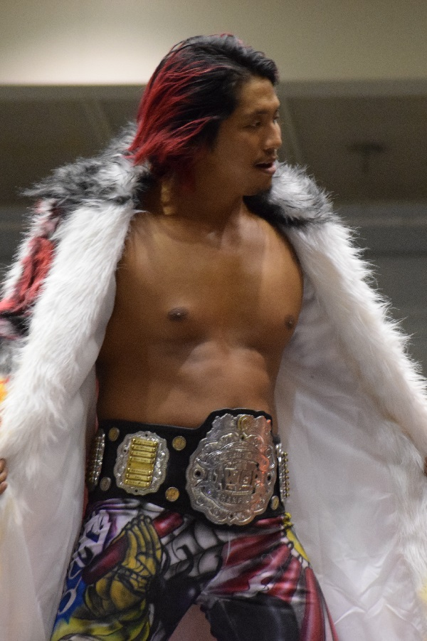 2017年1月13日 大阪府立体育会館・第二競技場「CMLL FANTASTICA MANIA 2017」 高橋ヒロム